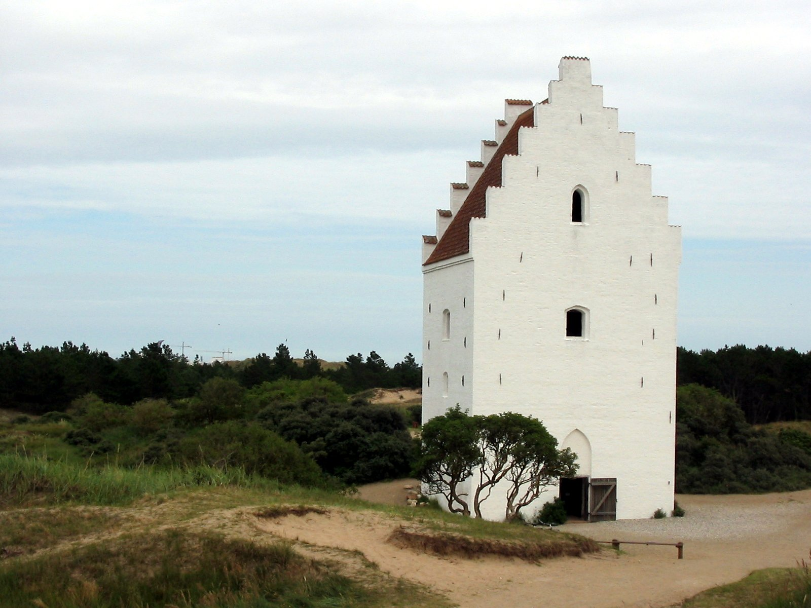 Den tilsandede kirke i Skagen